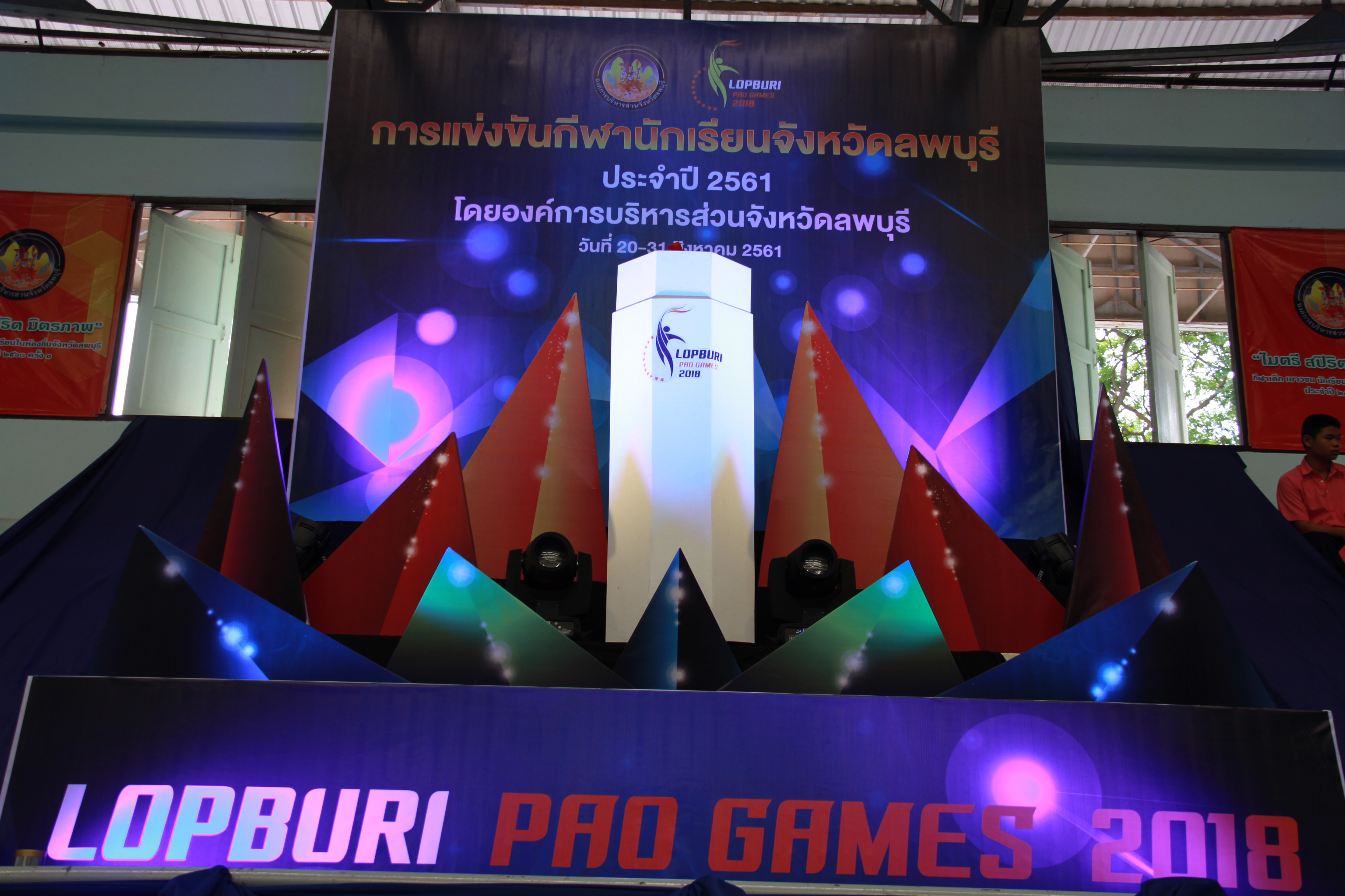 การแข่งขันกีฬานักเรียนจังหวัดลพบุรี ประจำปี 2561